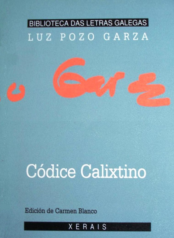 Códice Calixtino